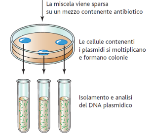 processo di selezione